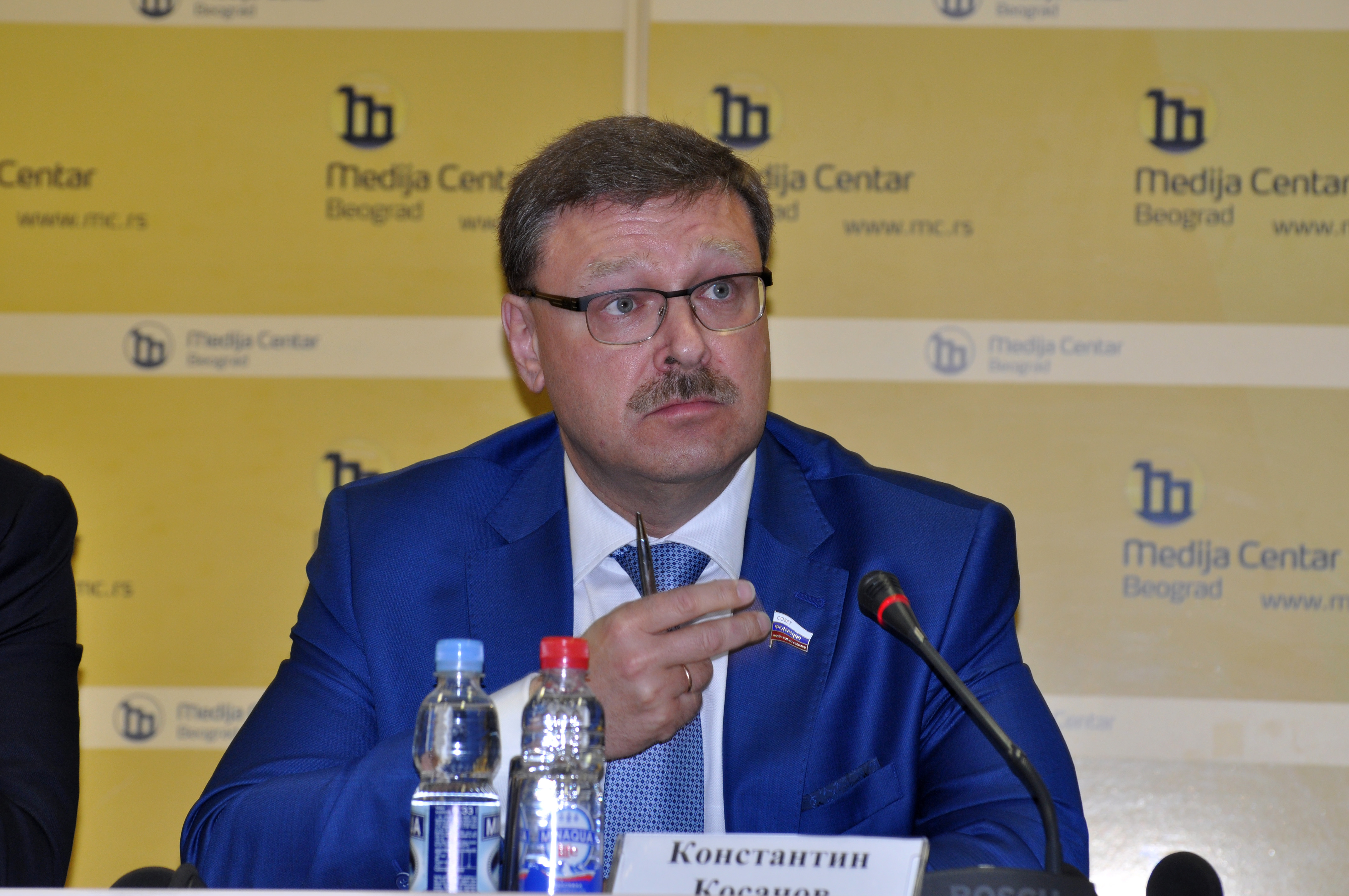 Konstantin Kosačov 2016